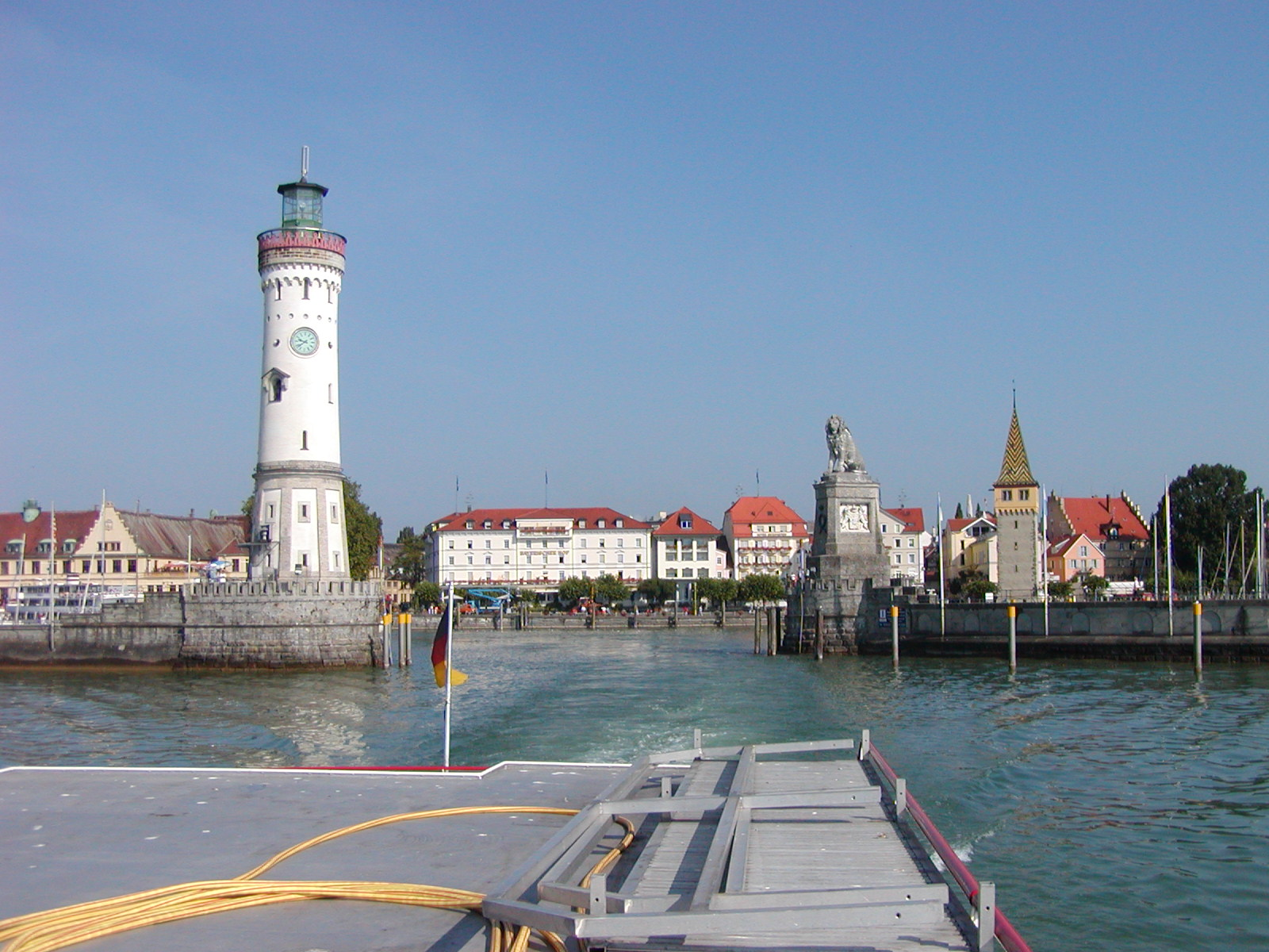 Hafeneinfahrt Lindau